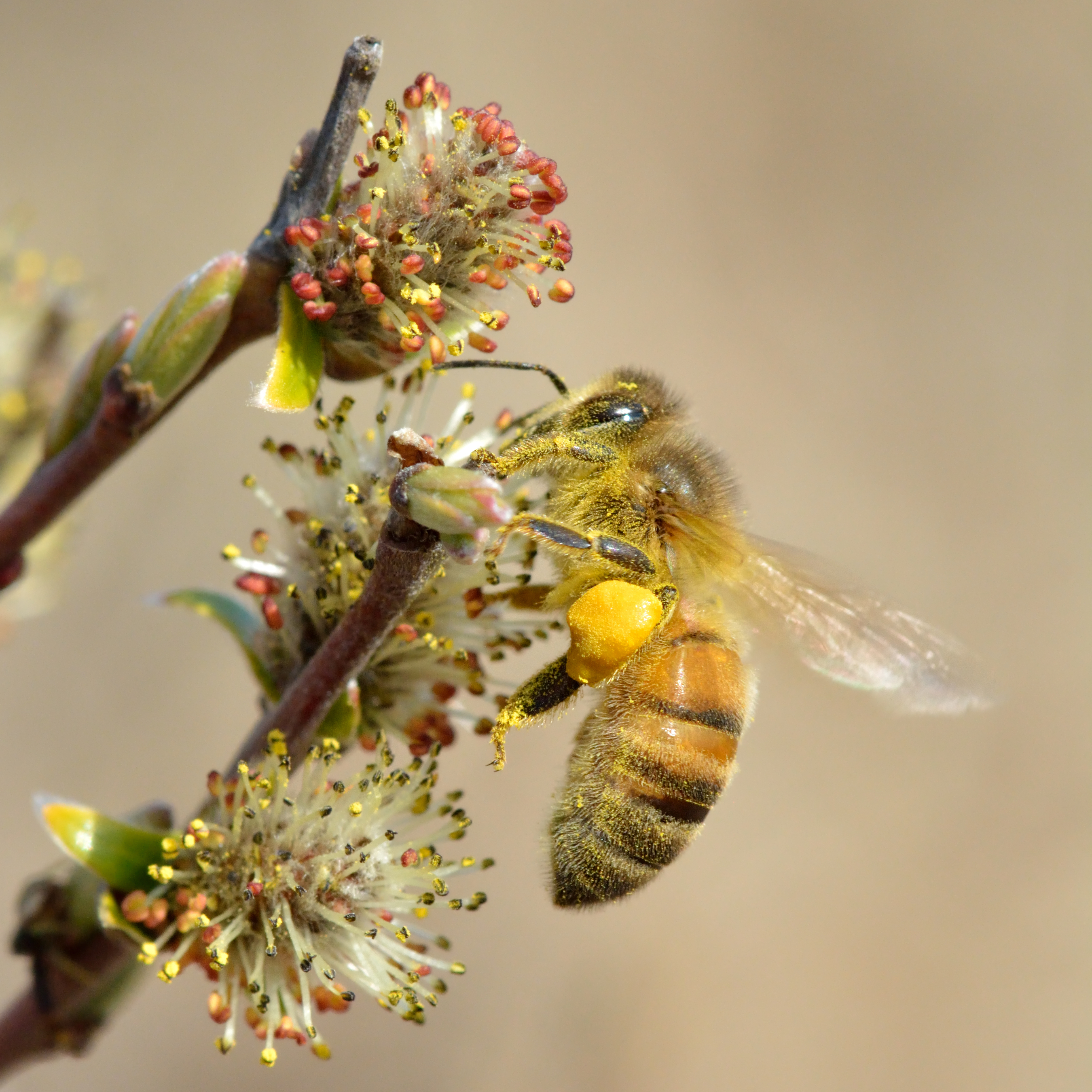 Meemesilane hundipajul (Salix rosmarinifolia). Keila, Loode-Eesti.